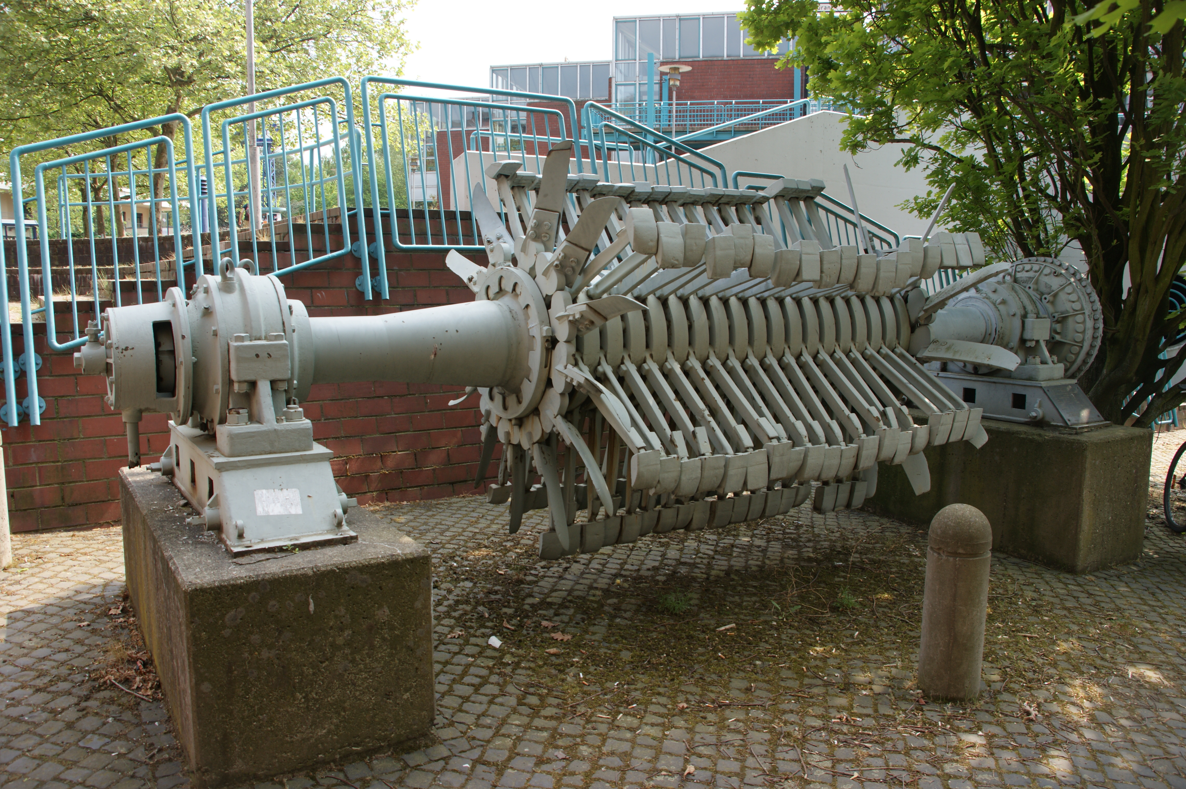 Läufer einer Kohlenmühle aus dem Kraftwerk Goldenberg, in Betrieb vom 16. April 1952 bis zum 31. März 1984, Masse: 10,2 t, Länge=5795 mm, Werkstoff: Stahl, Hersteller Babcock, Bauart: Schlägermühle ohne Sichter, Durchmesser: 2135 mm, Betriebsstunden: 198.981, f=590 Umdr./min